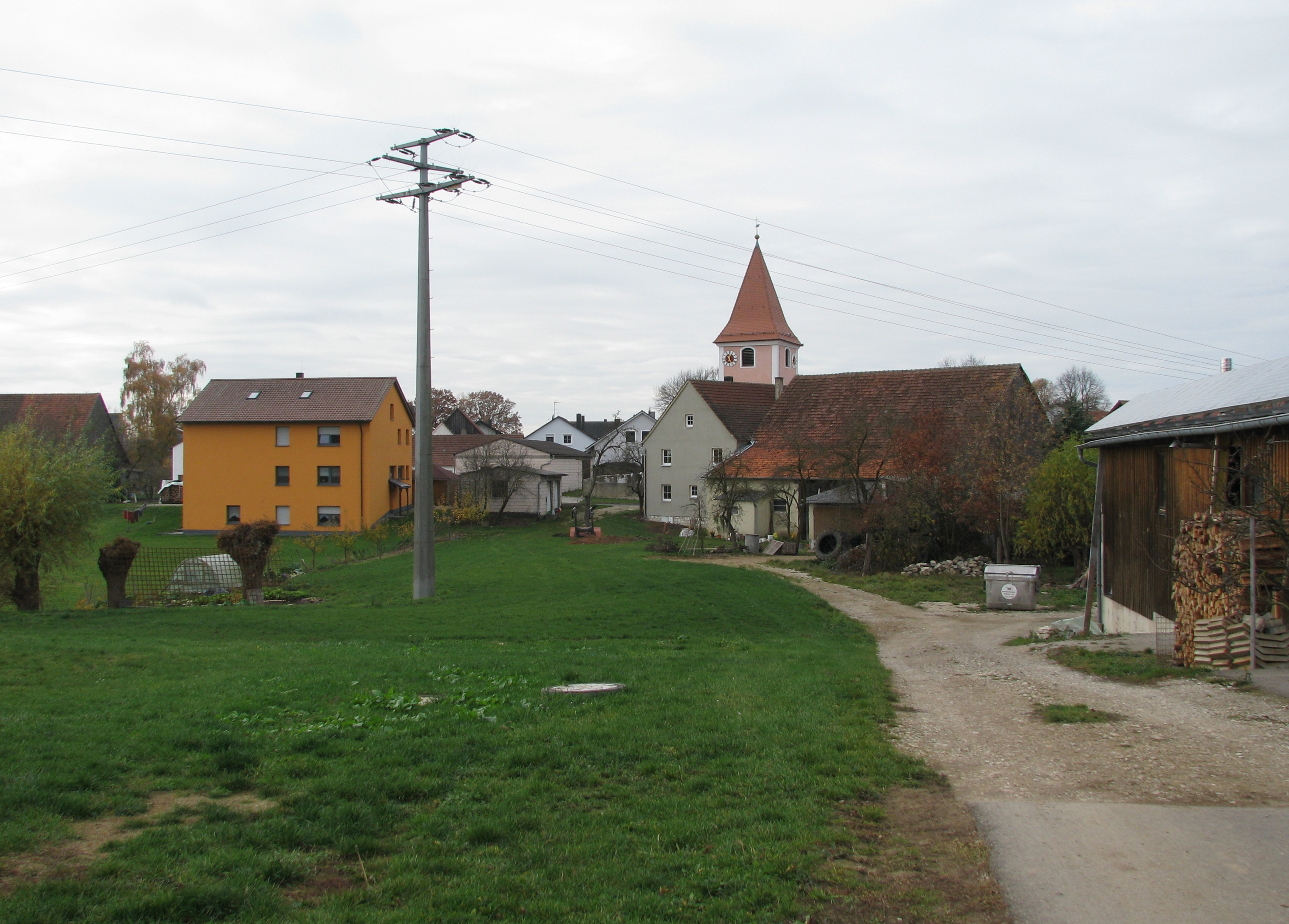 Oberndorf, Ortsteil der Stadt Freystadt im Landkreis Neumarkt in der Oberpfalz, Bayern